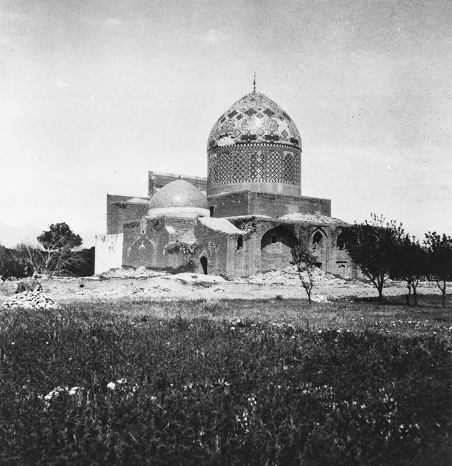 Mohammad Al-Mahruq Mosque before 1900